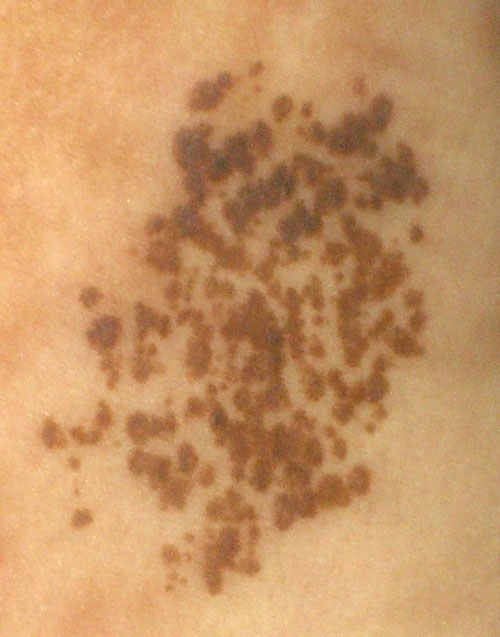 Nevus spilus / Naevus spilus